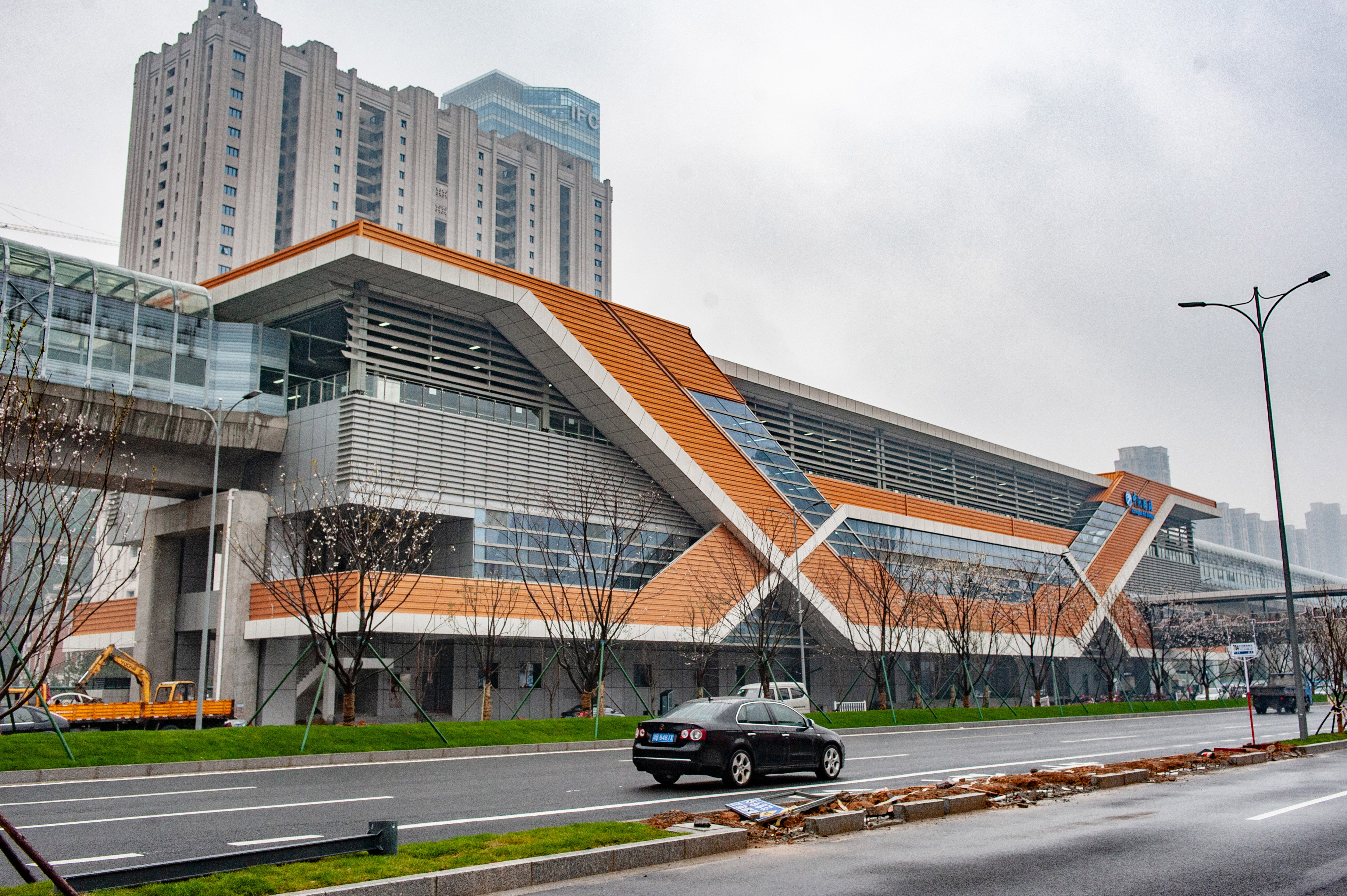 宁波地铁中河路站